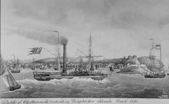 Prospekt av Kristiansand og Prinds Carl. Avfotografering av grafikk?/tegning?